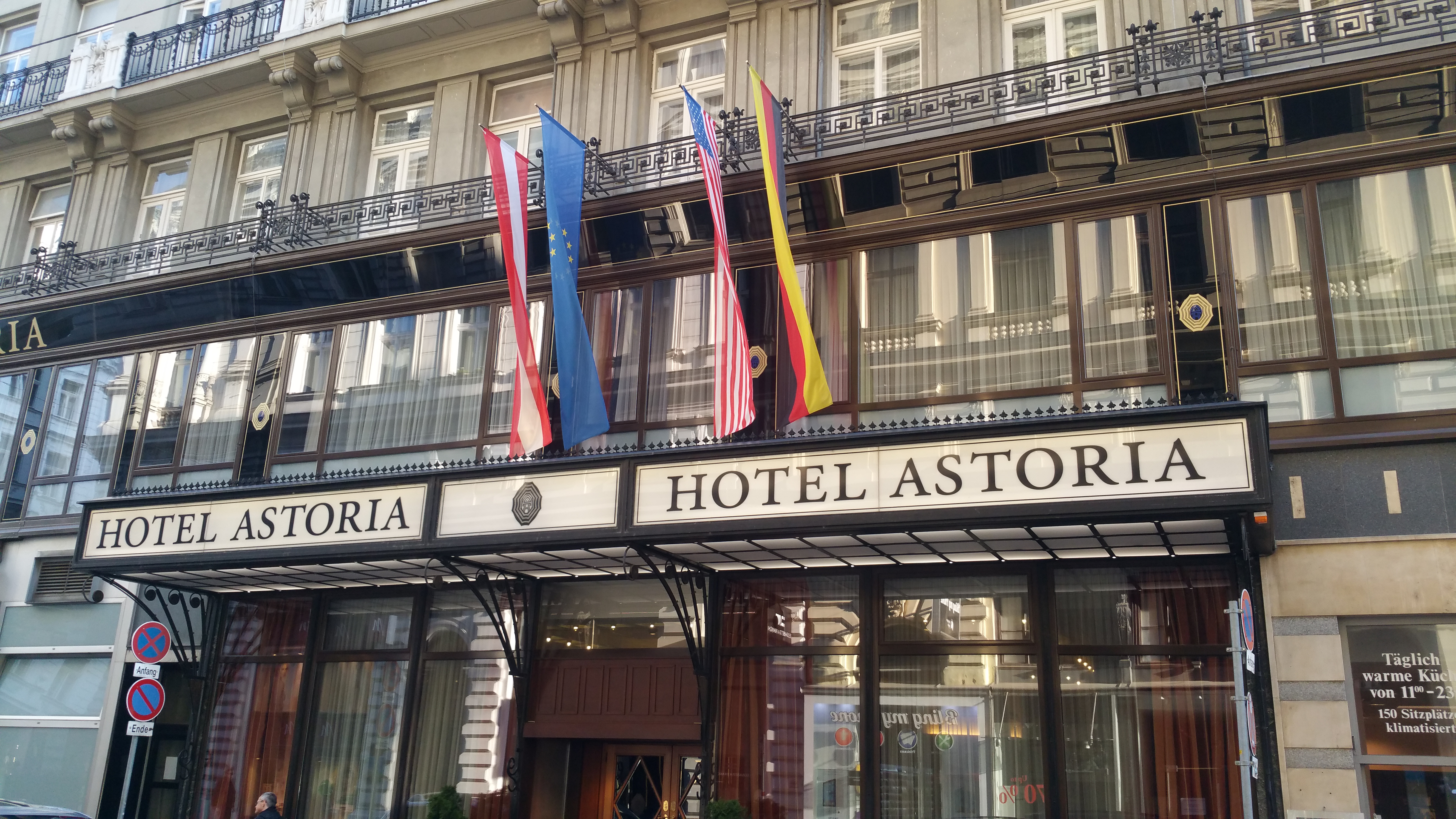 Hotel Astoria, Führichgasse 1, Wien-Innere Stadt